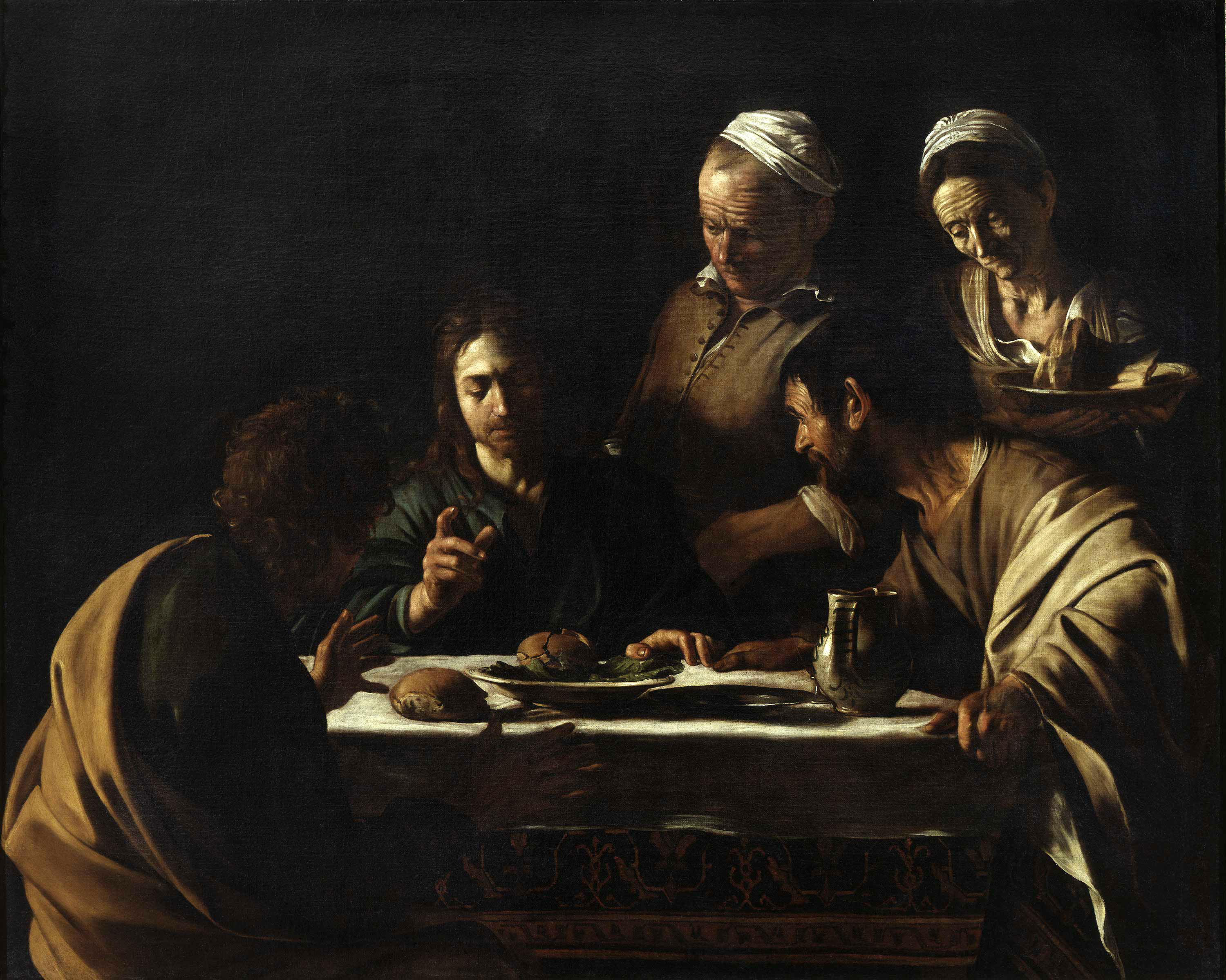 (Milan)